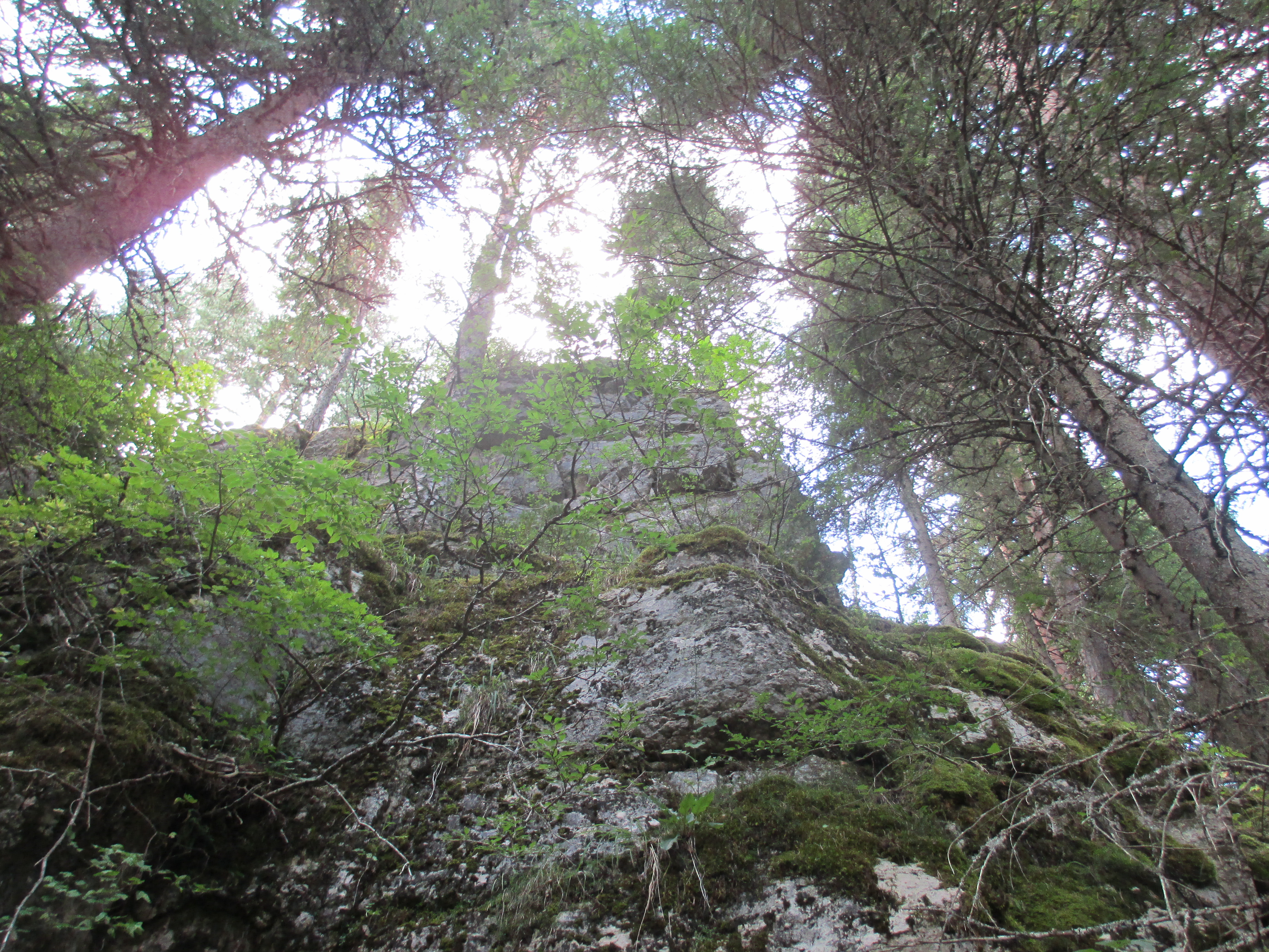 Тврђава Пошијак, остаци куле